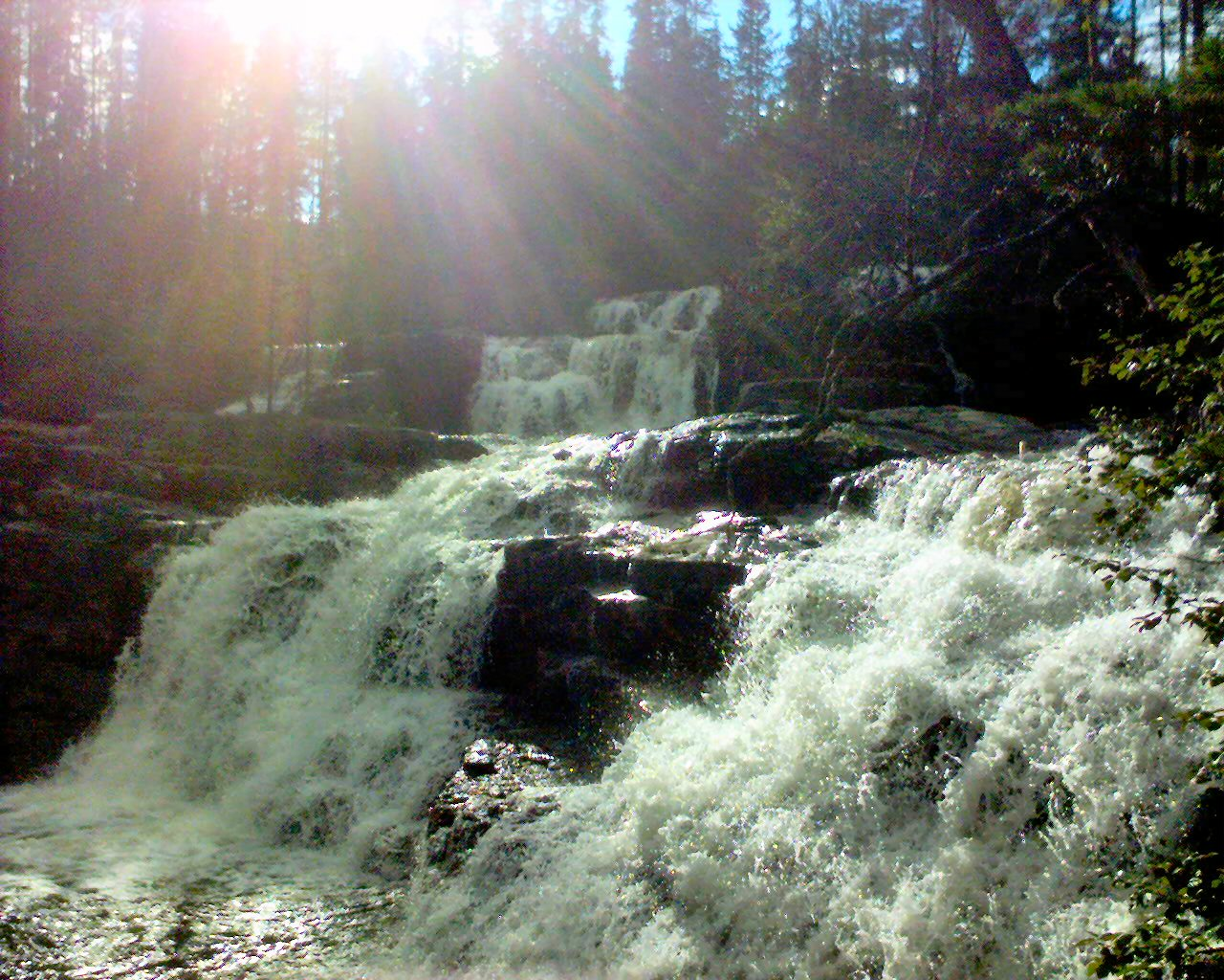 Första anblicken av Rändåfallet. Foto:Emil Åslund